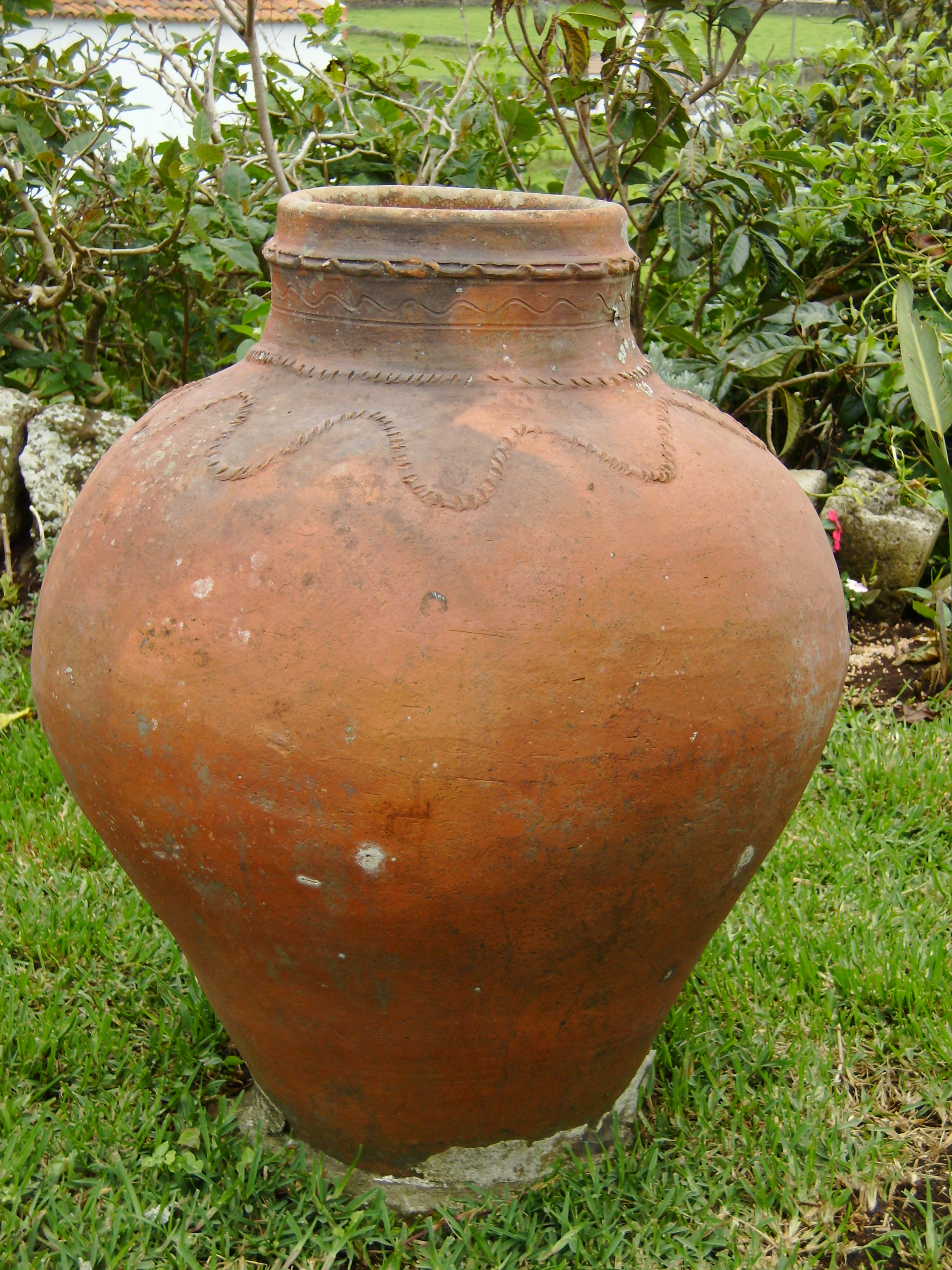 Antiga cerâmica utilitária artesanal da Ilha de Santa Maria (Açores), Portugal (Coleção Profa. Maria Celeste Bettencourt).